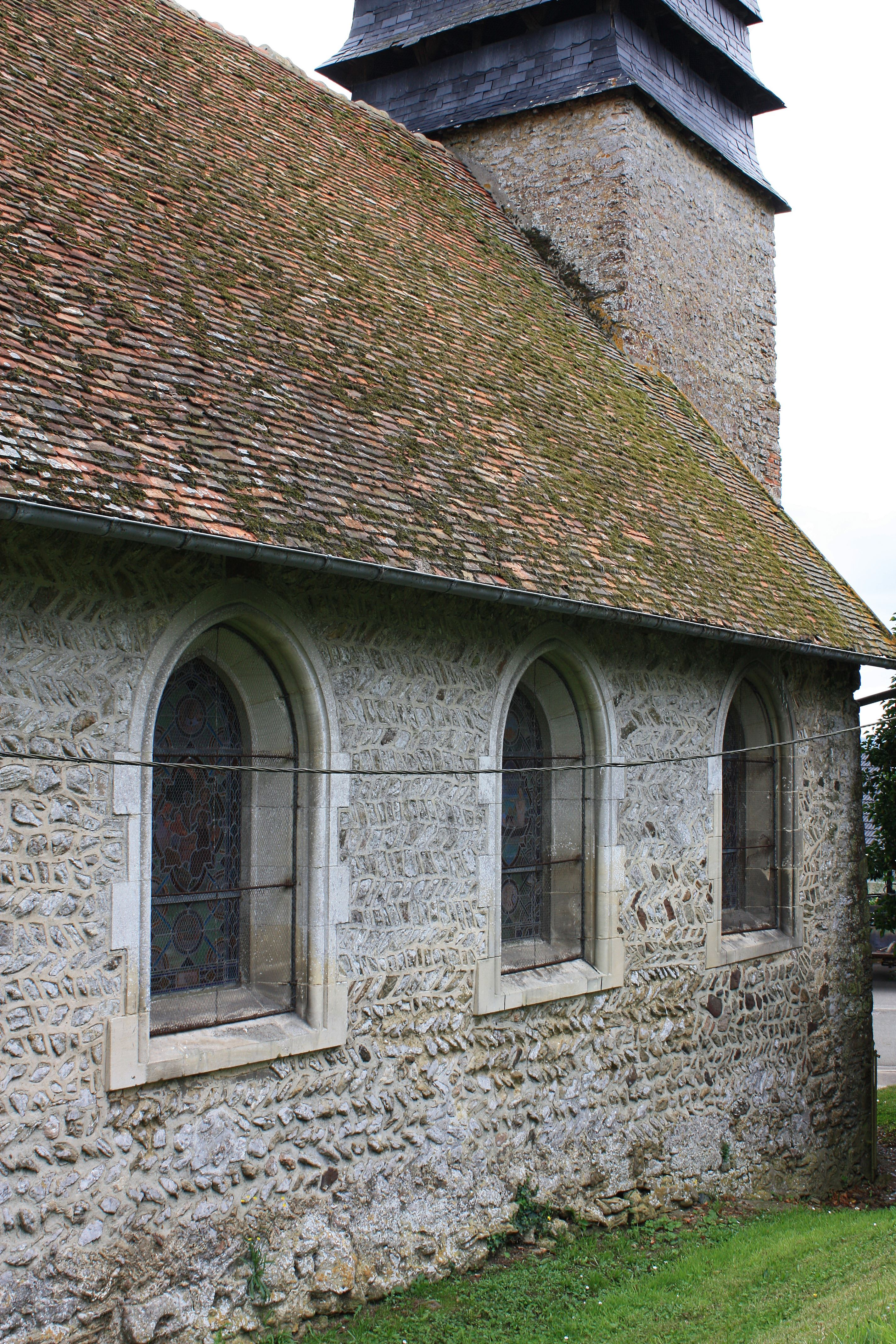 Mesnil-Mauger - Eglise Notre-Dame, vue du Nord-Est